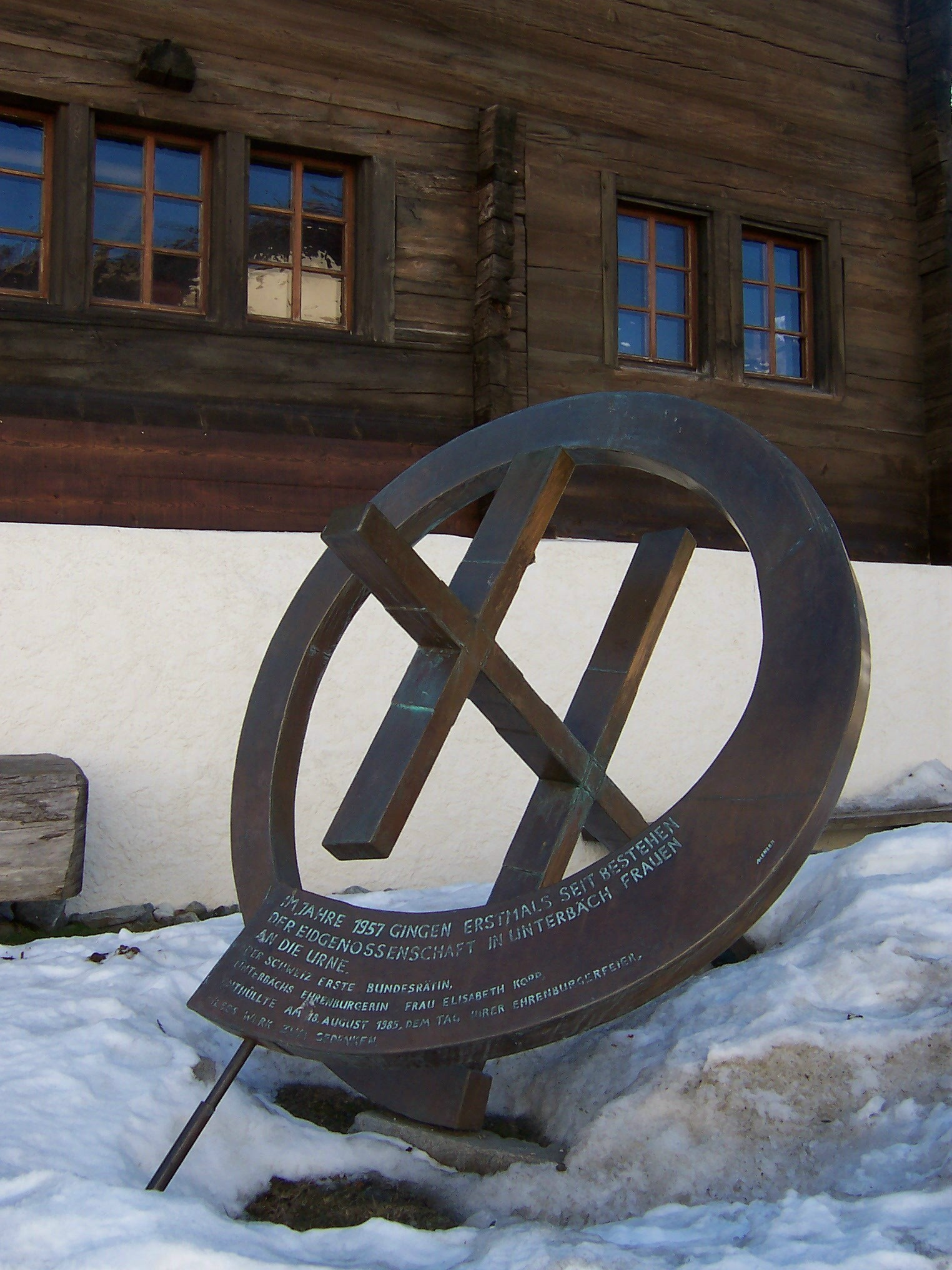 Kopp-Denkmal in Unterbäch, gewidmet der historischen unterbächer Frauenabstimmung von 1957 und der ersten Bundesrätin Elisabeth Kopp, Ehrenbürgerin der Gemeinde, die dieses Denkmal 1985 enthüllte. Die robuste bronze Gedenkskulptur des Walliser Künstlers Andreas Henzen aus St. German stellt das unterbächer Wappensymbol, ein Doppelkreuz, mitten in einem schwungvollen, leicht spiralförmigen und immer breiter werdenden Bandes dar. Die ästhetische Plastik, die in ihrer Form auch einer Sonnenuhr ähnelt, könnte die erfüllte Zeit der Schweizer Frauen bildlich ausdrücken, wie es durch die eingeprägte Widmung am breitesten Teil des Bronzebandes mit Worten formuliert wird: „Im Jahre 1957 gingen erstmals seit Bestehen der Eidgenossenschaft in Unterbäch Frauen an die Urne − Der Schweiz erste Bundesrätin, Unterbächs Ehrenbürgerin Frau Elisabeth Kopp, enthüllte am 18. August 1985, dem Tag ihrer Ehrenburgerfeier, dieses Werk zum Gedenken.“ Signiert rechts von der Aufschrift: "AHenzen".